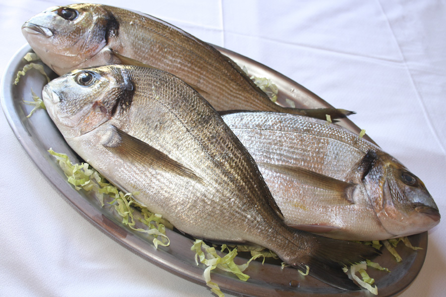 Doradas del palangre capturadas en Chipiona. Foto realizada en Venta Aurelio. Restaurante en Chipiona. Cádiz